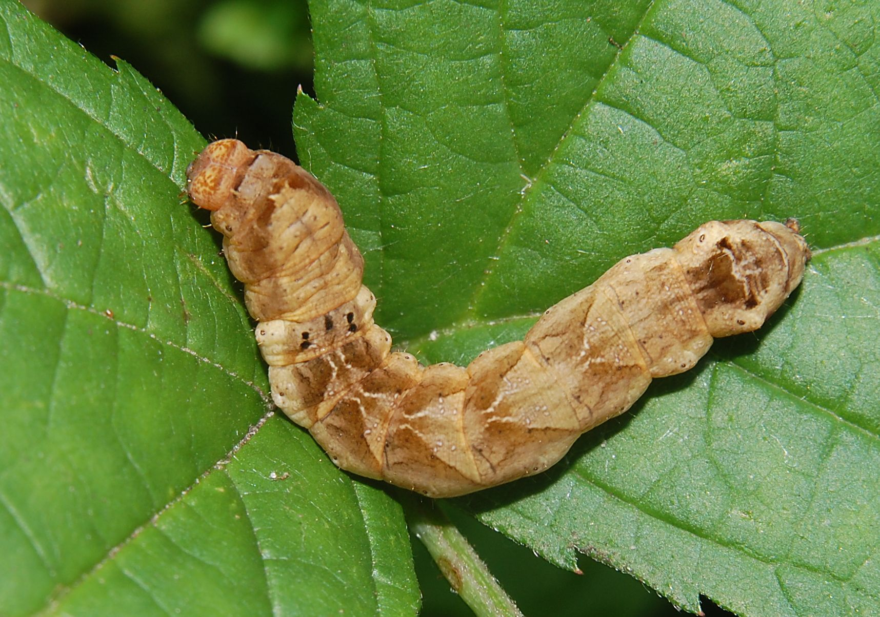 Thyatira batis, Raupe (Drepanidae), Tiefwerder, Spandau, Berlin